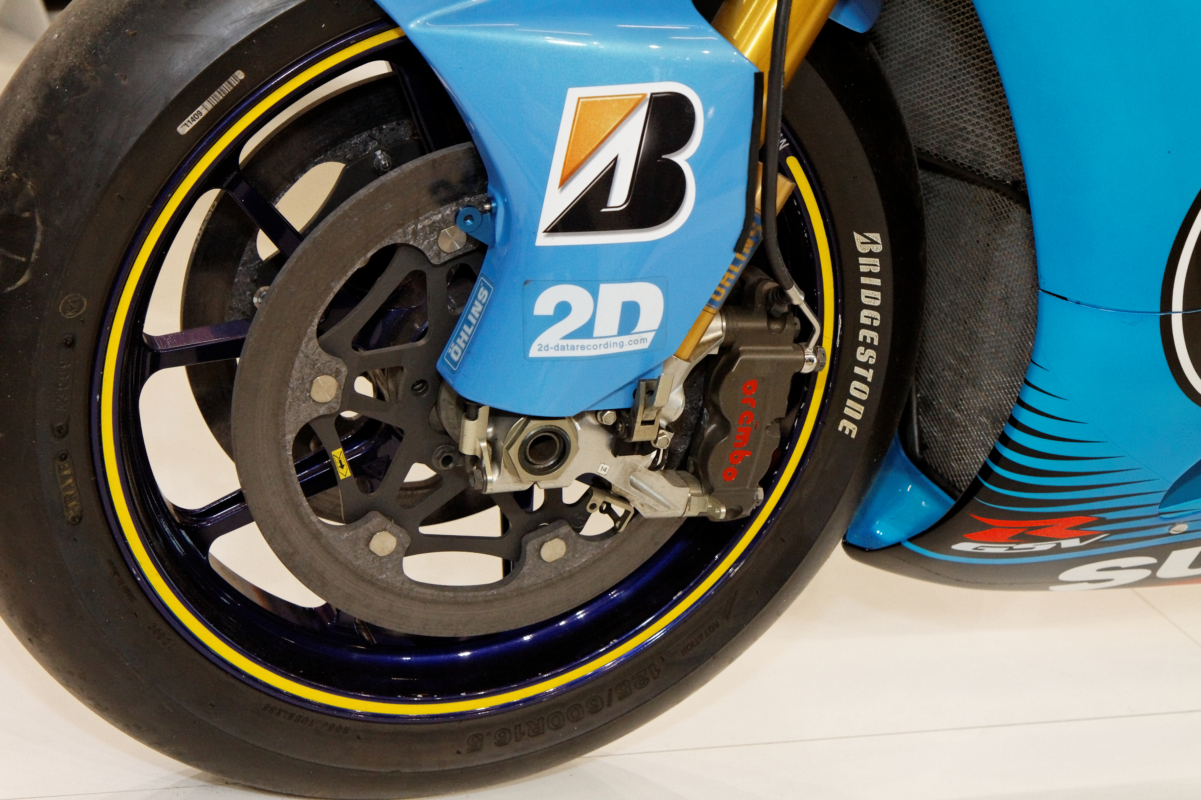 Suzuki - MotoGP 2011